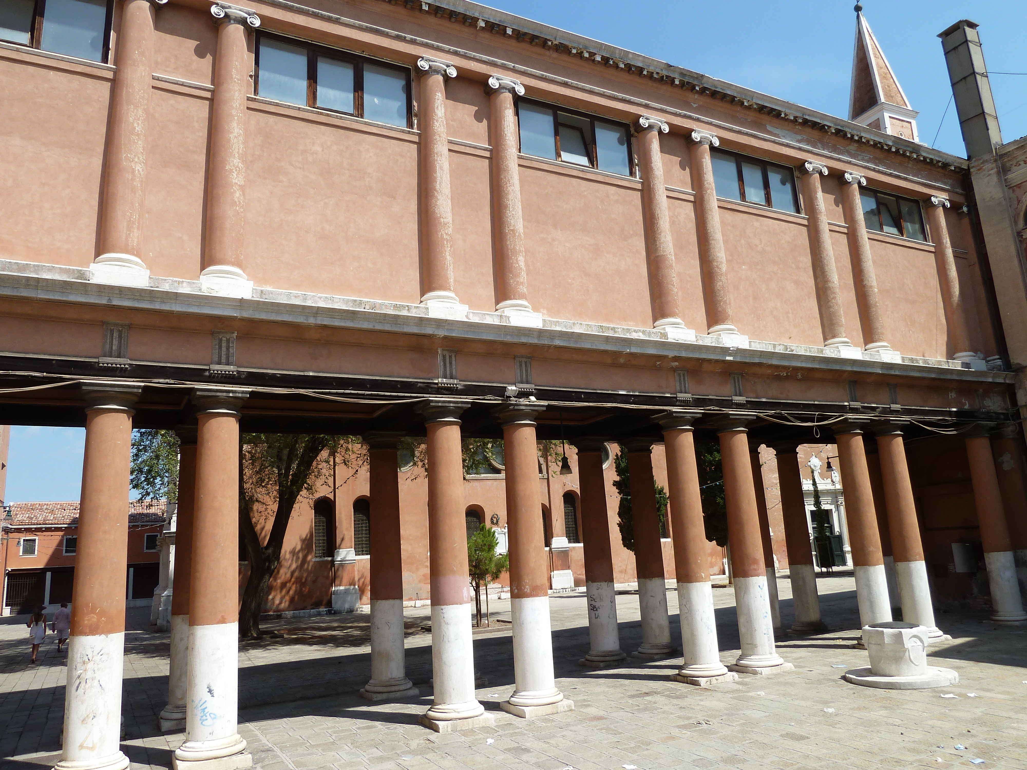 Galleria della nunziatura